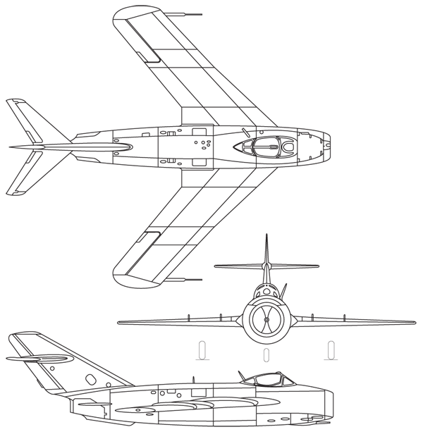 MiG-17 3-view_drawing